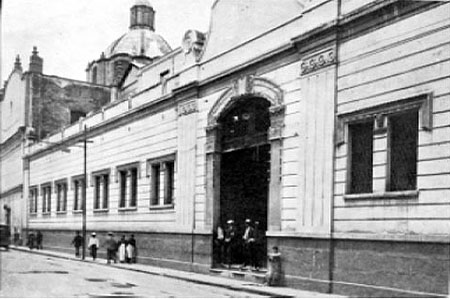 Año de 1926, de lo que fue la fachada del Convento de San Lorenzo Mártir y la propia iglesia que se aprecia al fondo